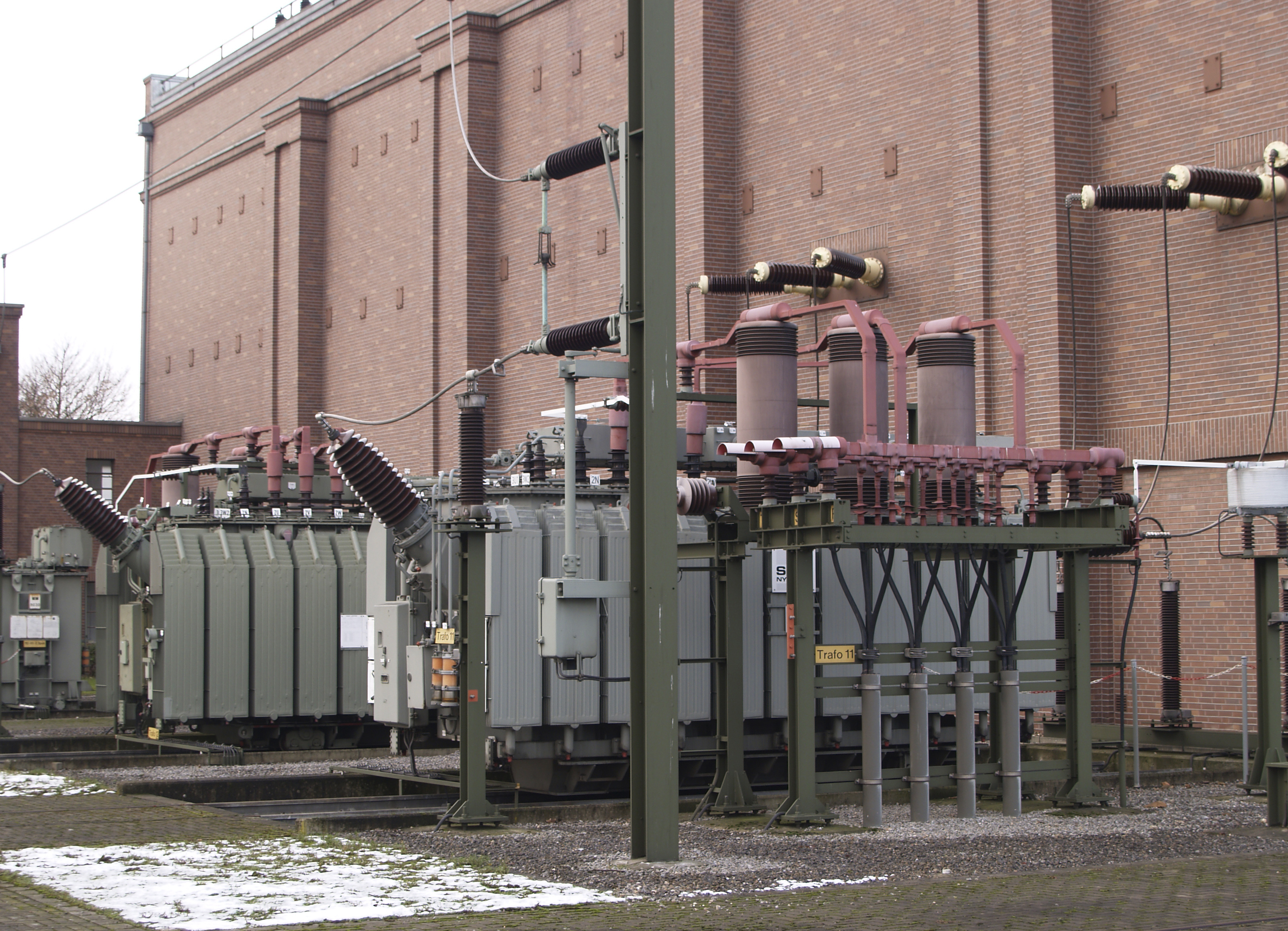 Tranformers 110 kV, at VEW Transformerstation Recklinghausen